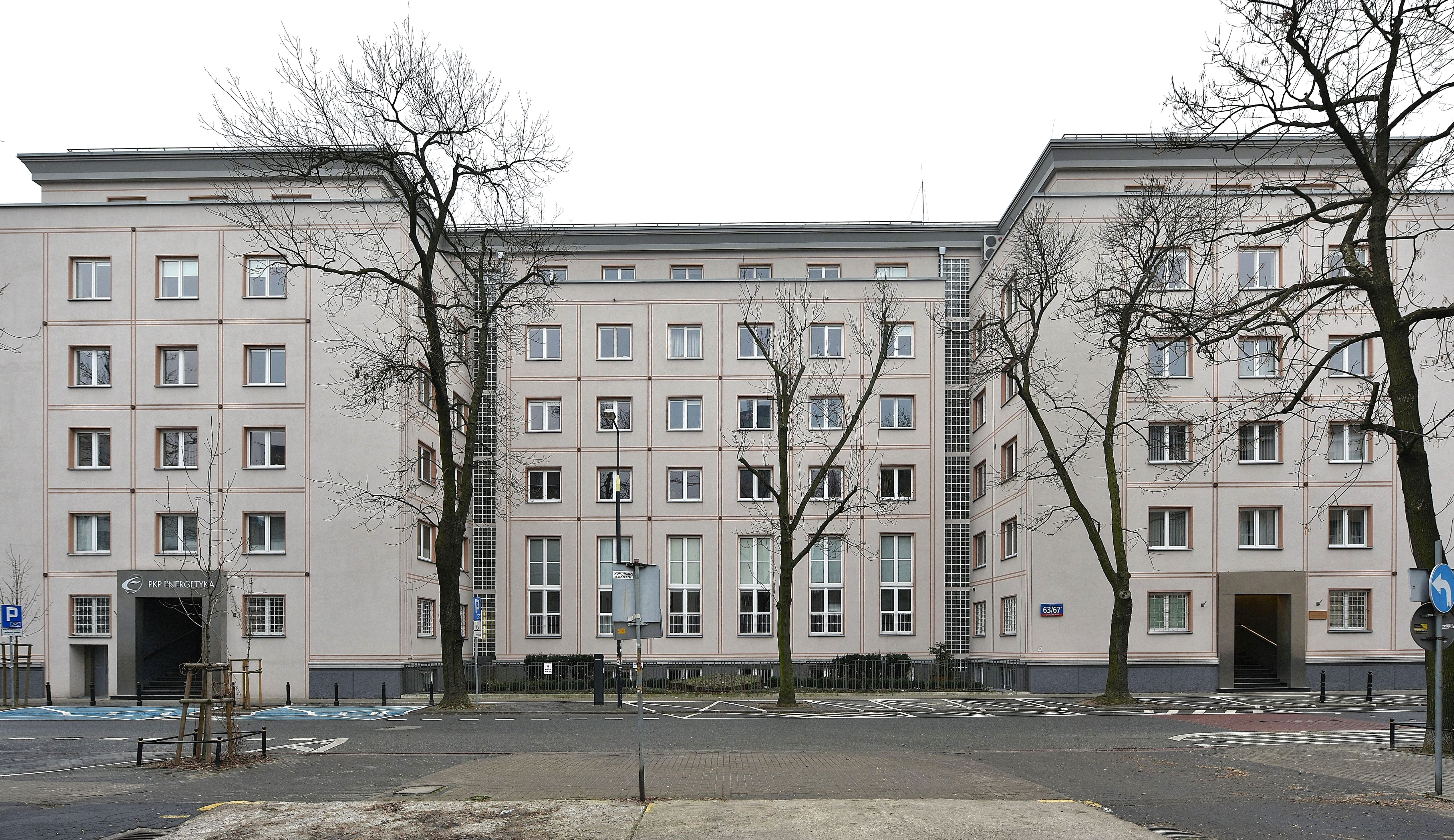 Siedziba spółki PKP Energetyka przy ul. Hożej 63/67